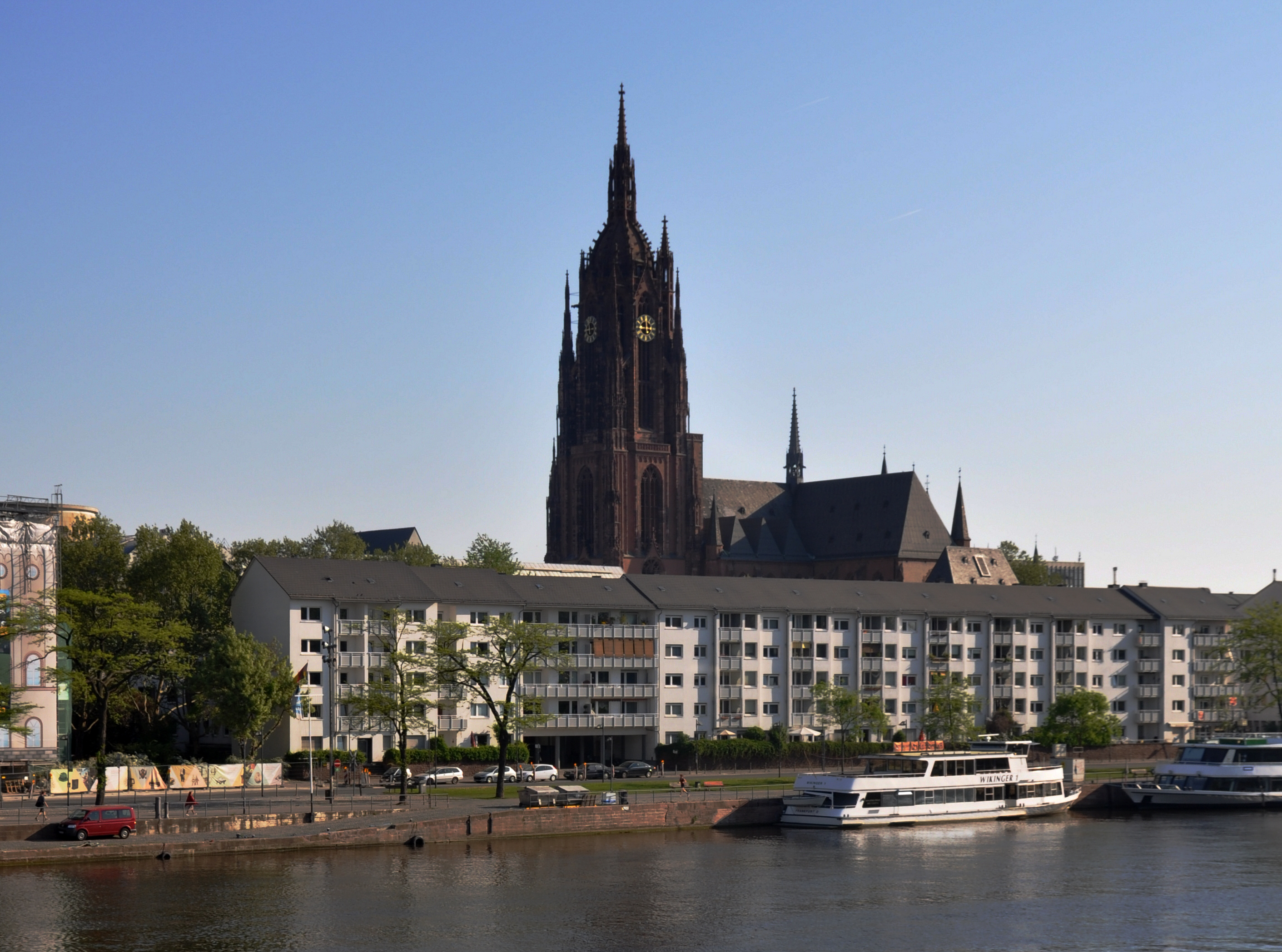 Frankfurt am Main, Dom und Bebauung der 1950er Jahre am Mainkai